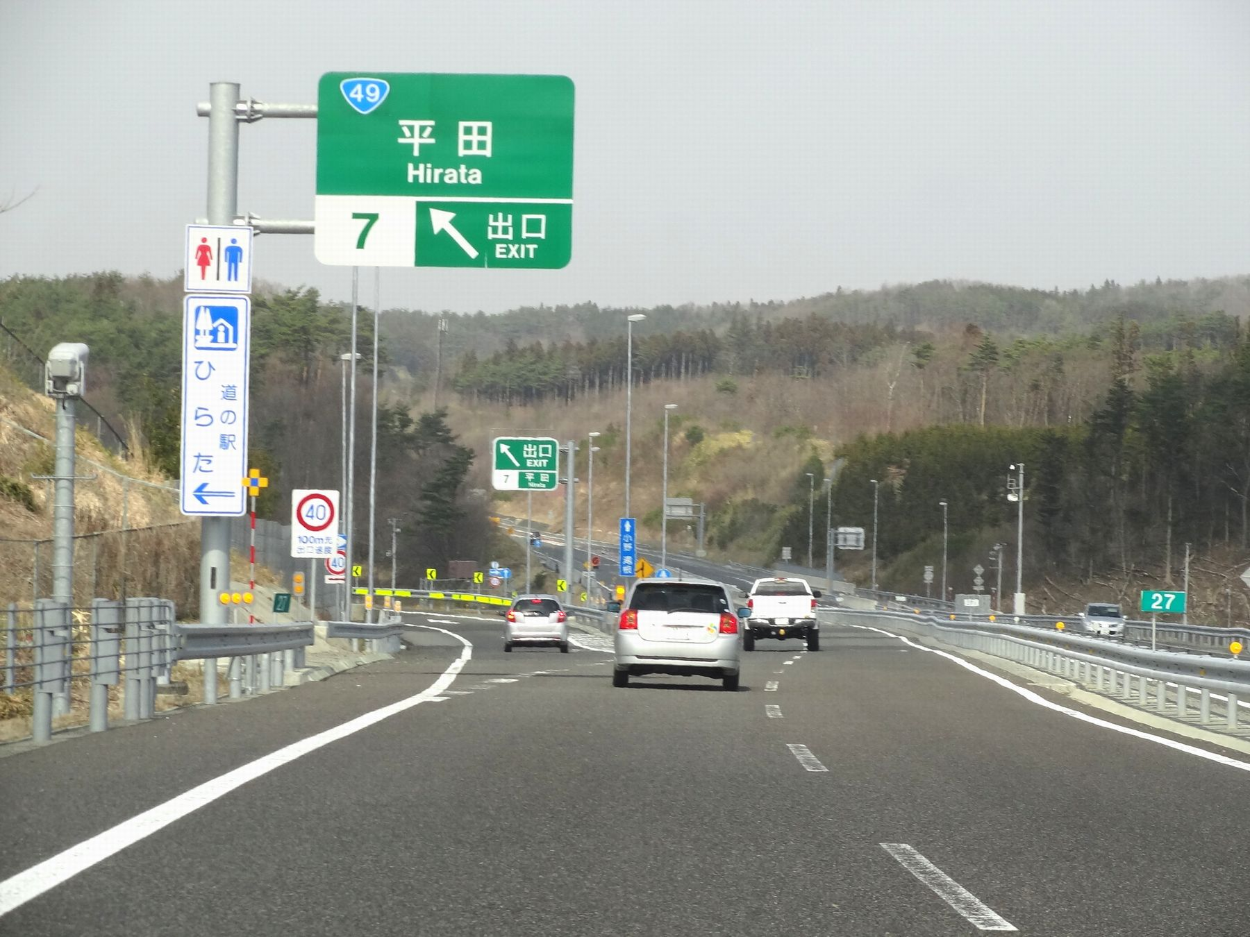 あぶくま高原道路 平田IC（下り線出口付近）